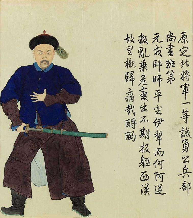 平定西域紫光閣功臣像第三位-班第（No.3 meritorious officer Bandi's painting of Ziguang Ge after pacifying Xiyu）